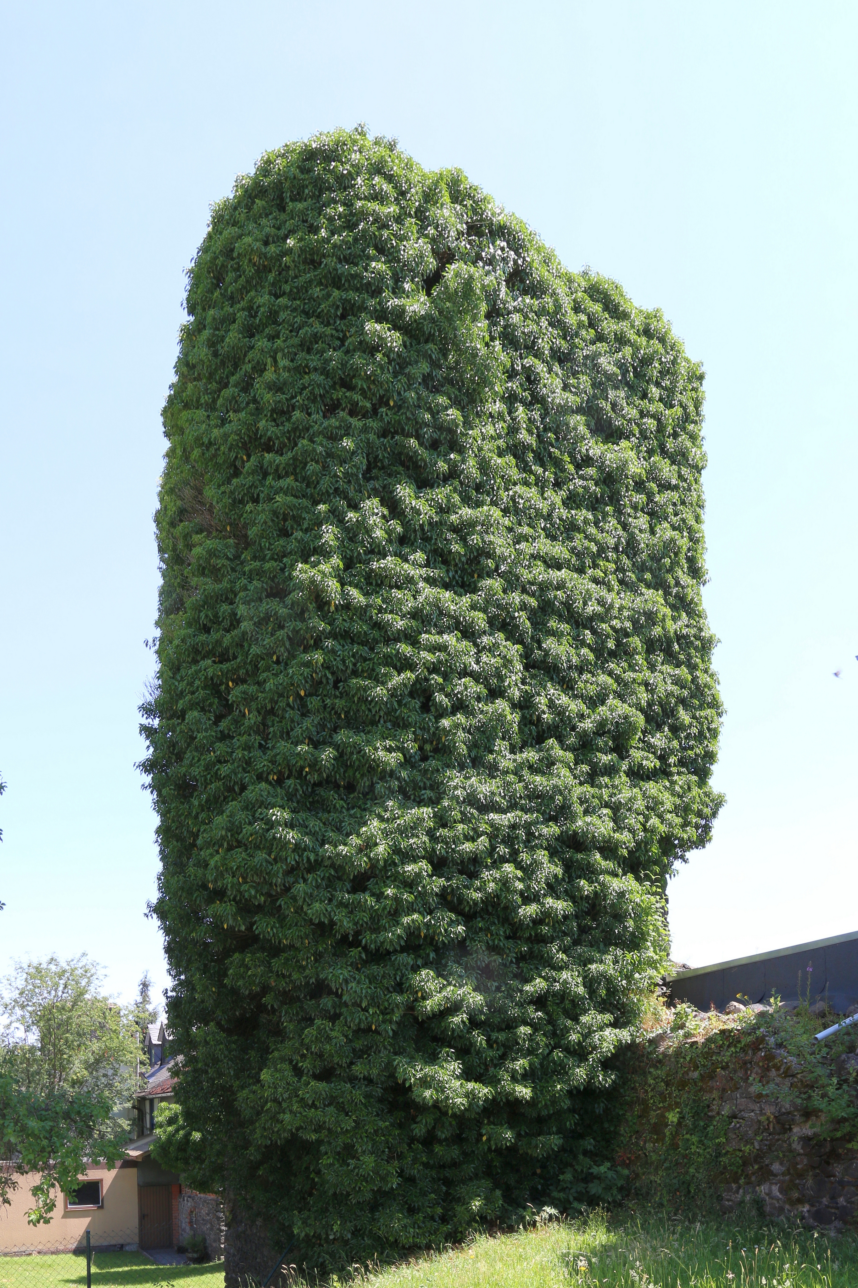 Driedorf: Oberburg Turmstraße bei Nr. 4